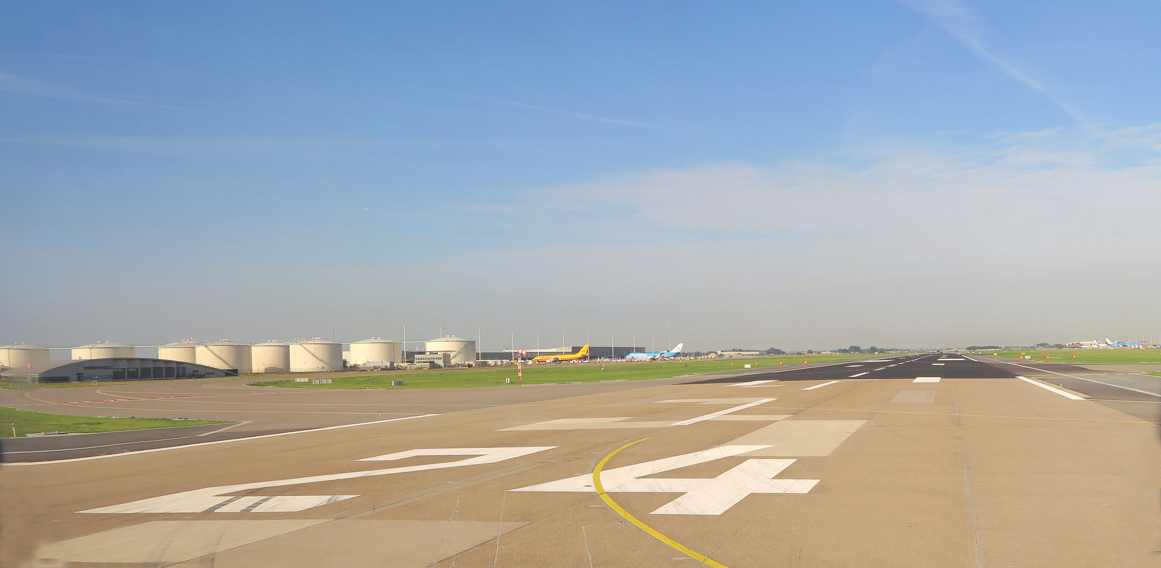 De Kaagbaan (24-06) gezien naar het zuidoosten